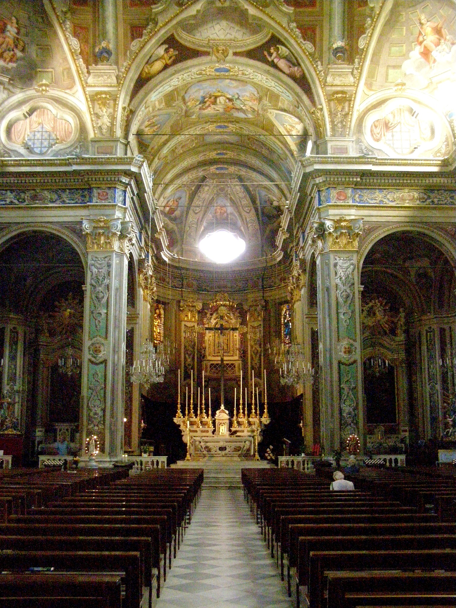 Interiér baziliky. Pohľad smerom k hlavnému oltáru